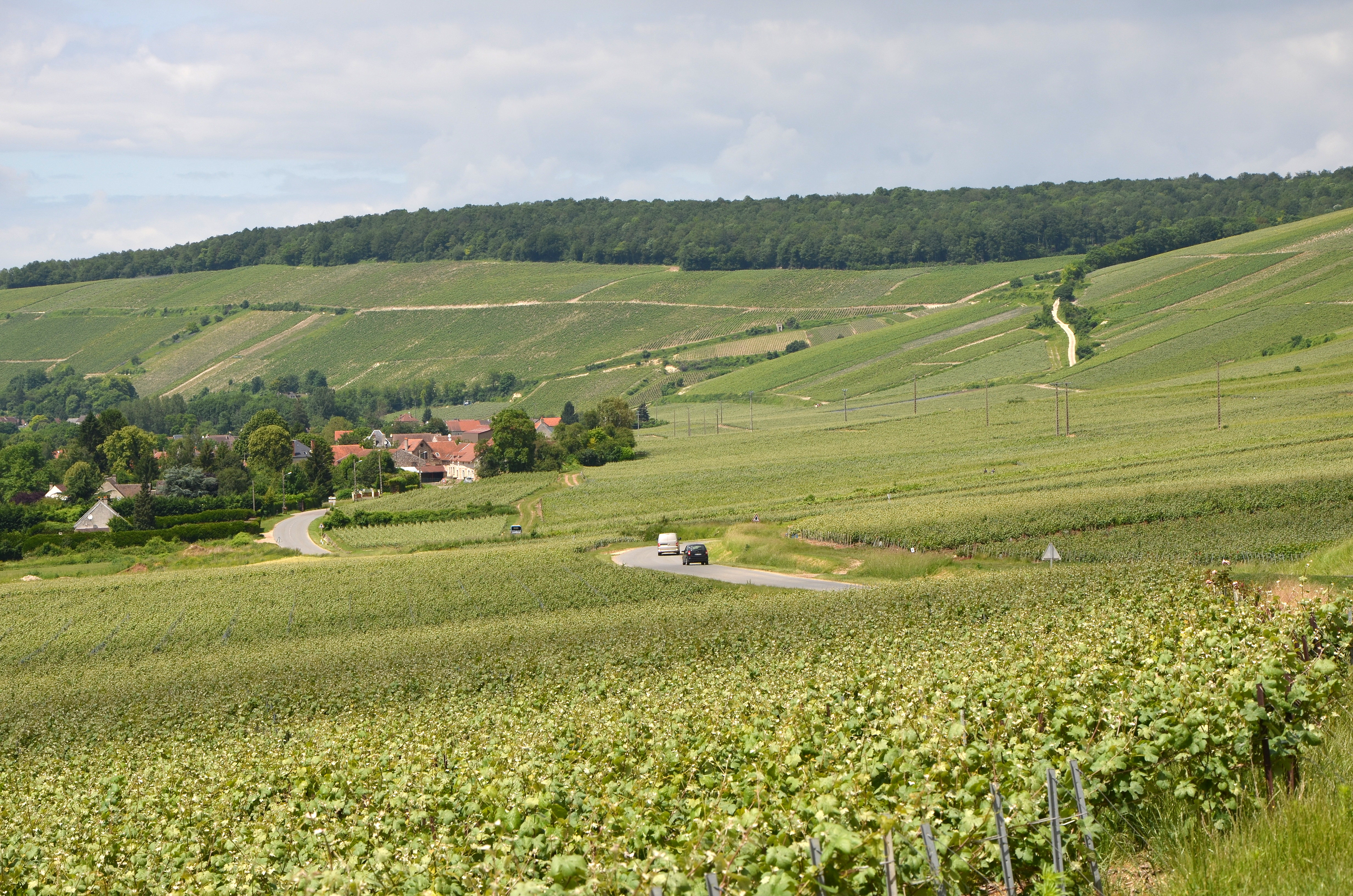 Vue sur Rosay hameau de Barzy sur Marne, Aisne, France